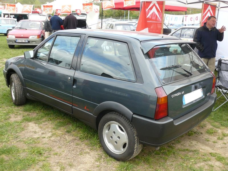 Mantes la Jolie 2012